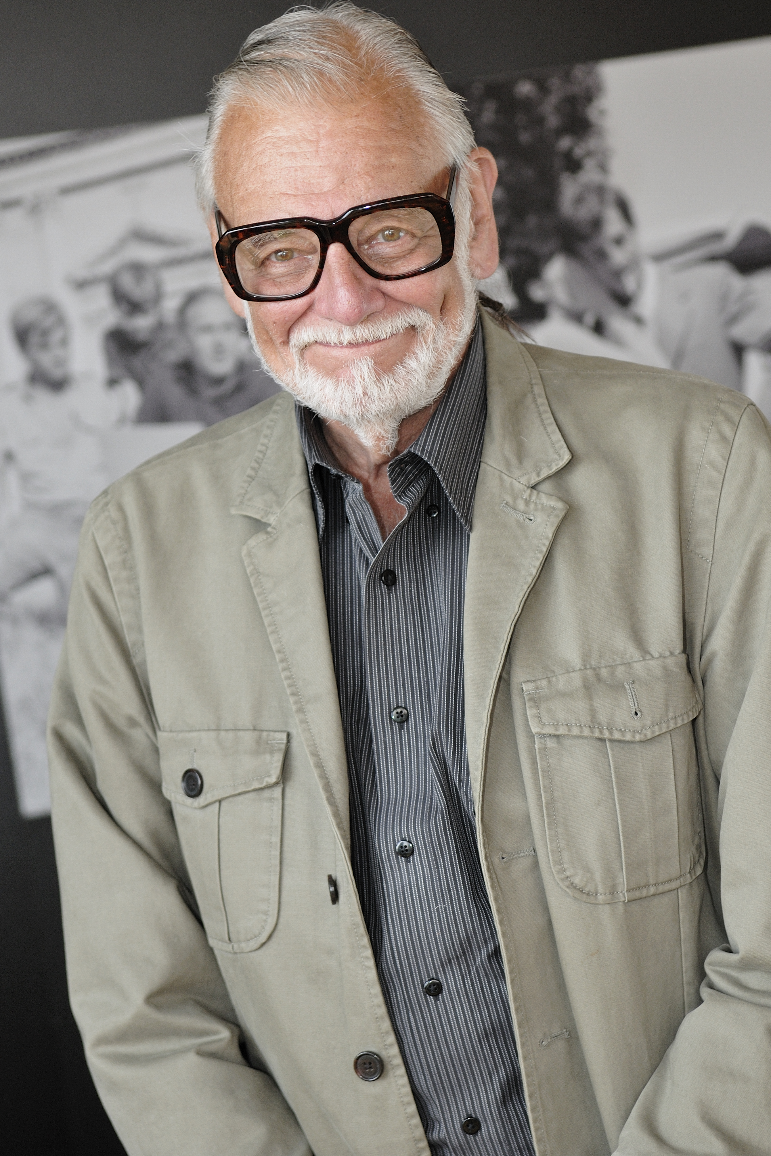 66ème Festival du Cinéma de Venise (Mostra), 8ème jour (07/09/2009) George Romero pour une interview avec Laurent Pecha d'